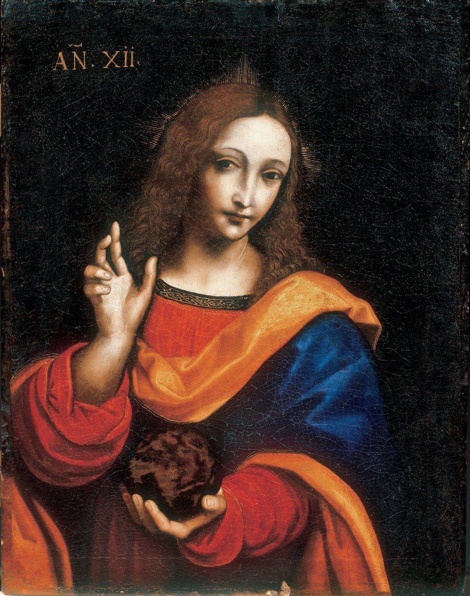 Gian Giacomo Caprotti, detto il Salaì, Cristo giovanetto come Salvator Mundi